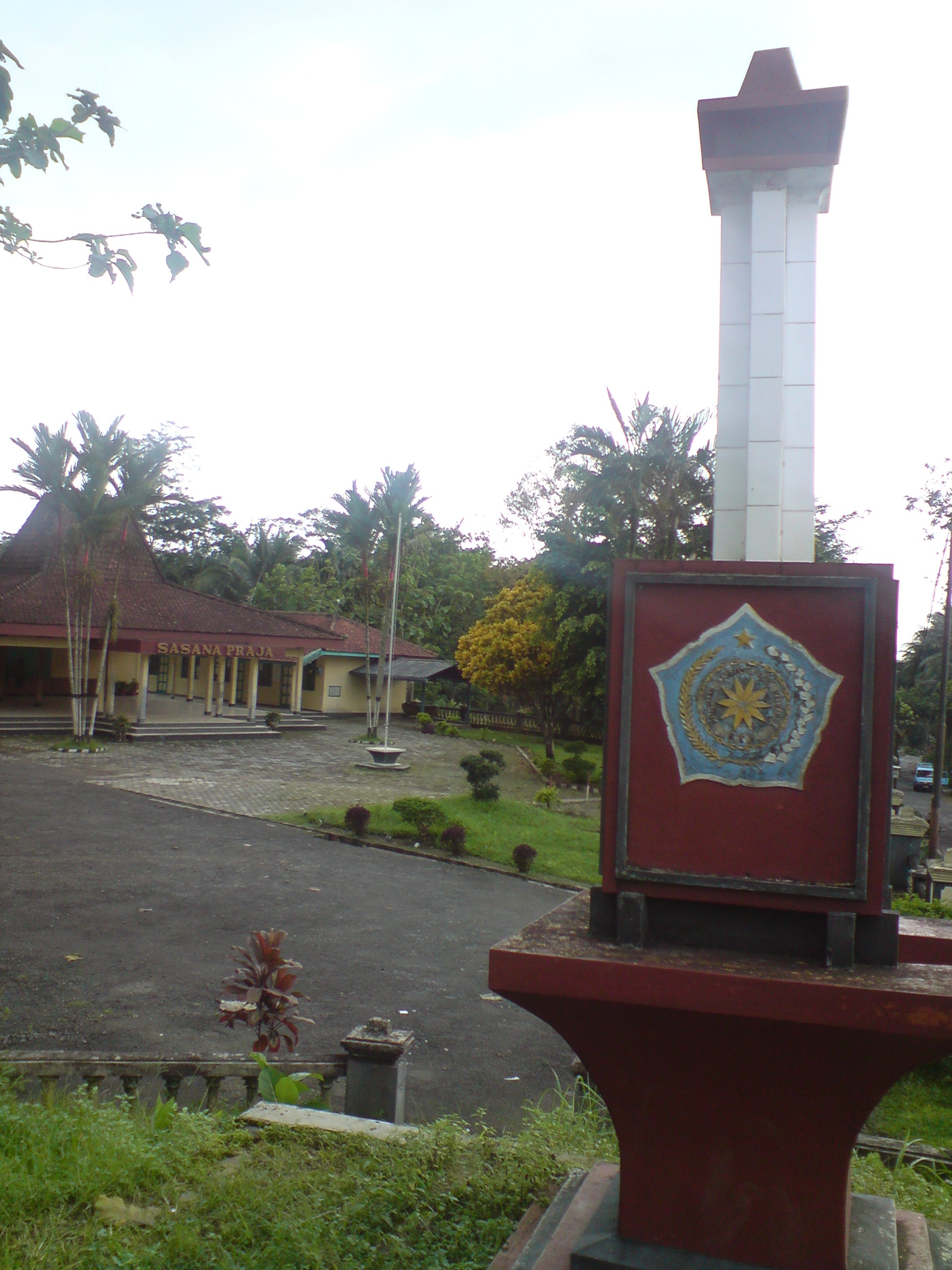 diambil disamping kiri balai desa